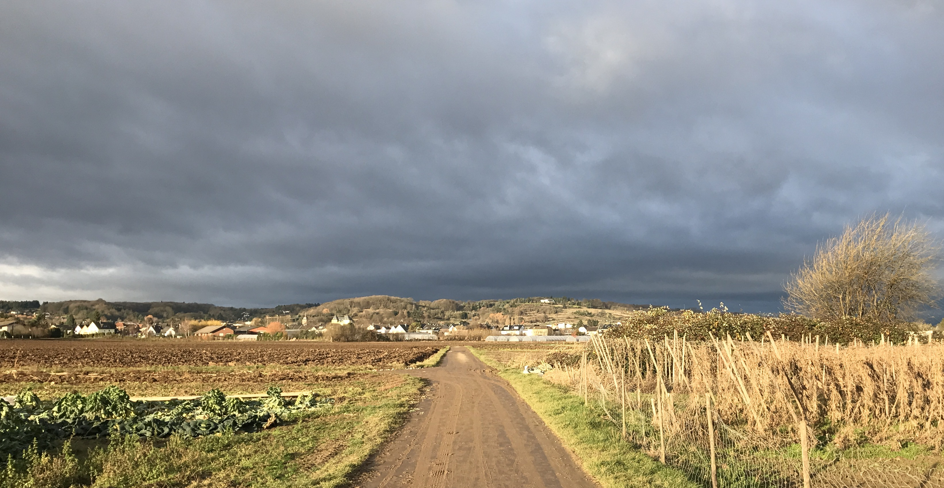 Alfter vor dunklem Himmel